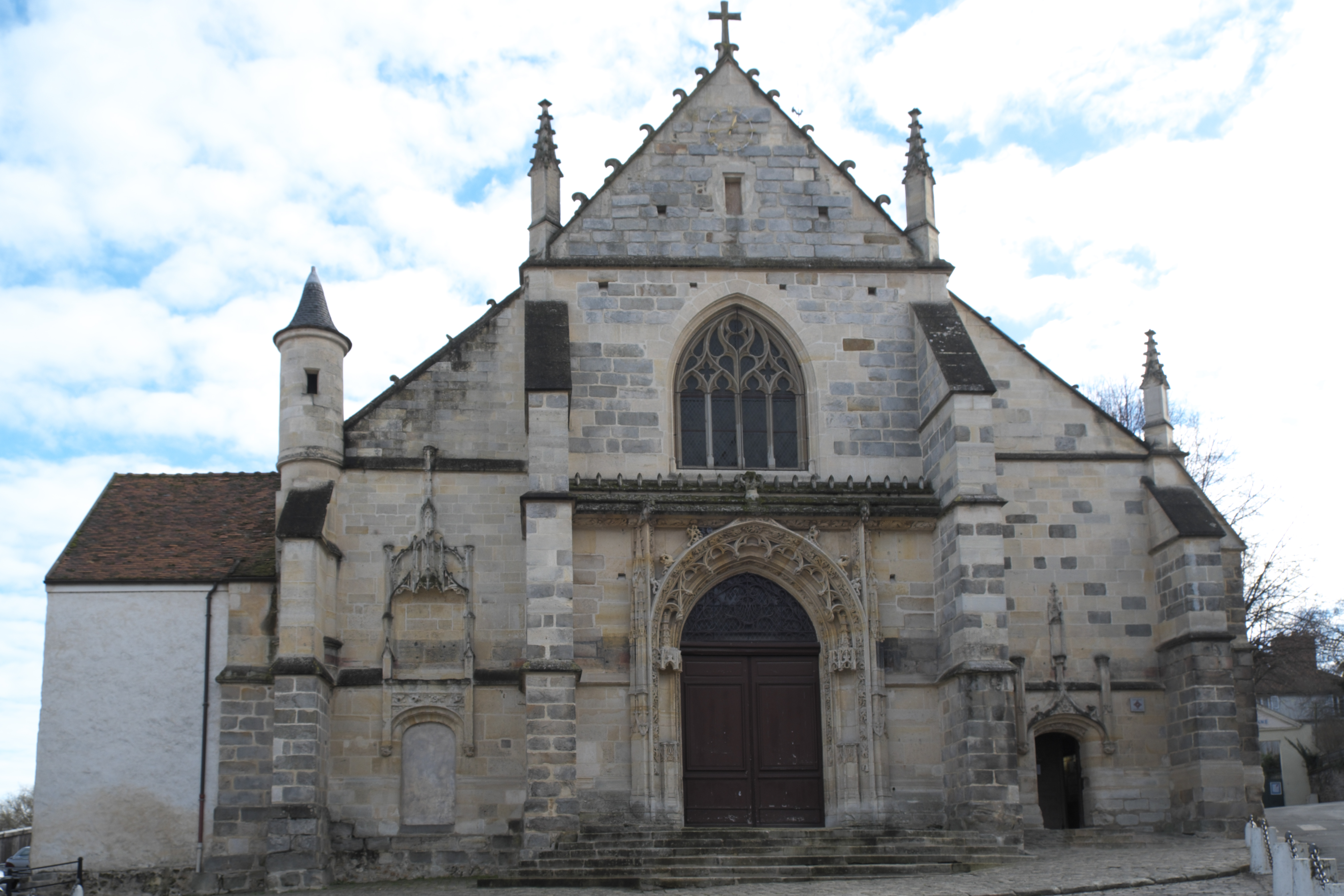 Katholische Pfarrkirche Saint-Martin in Longjumeau im Département Essonne (Île-de-France/Frankreich), Westfassade